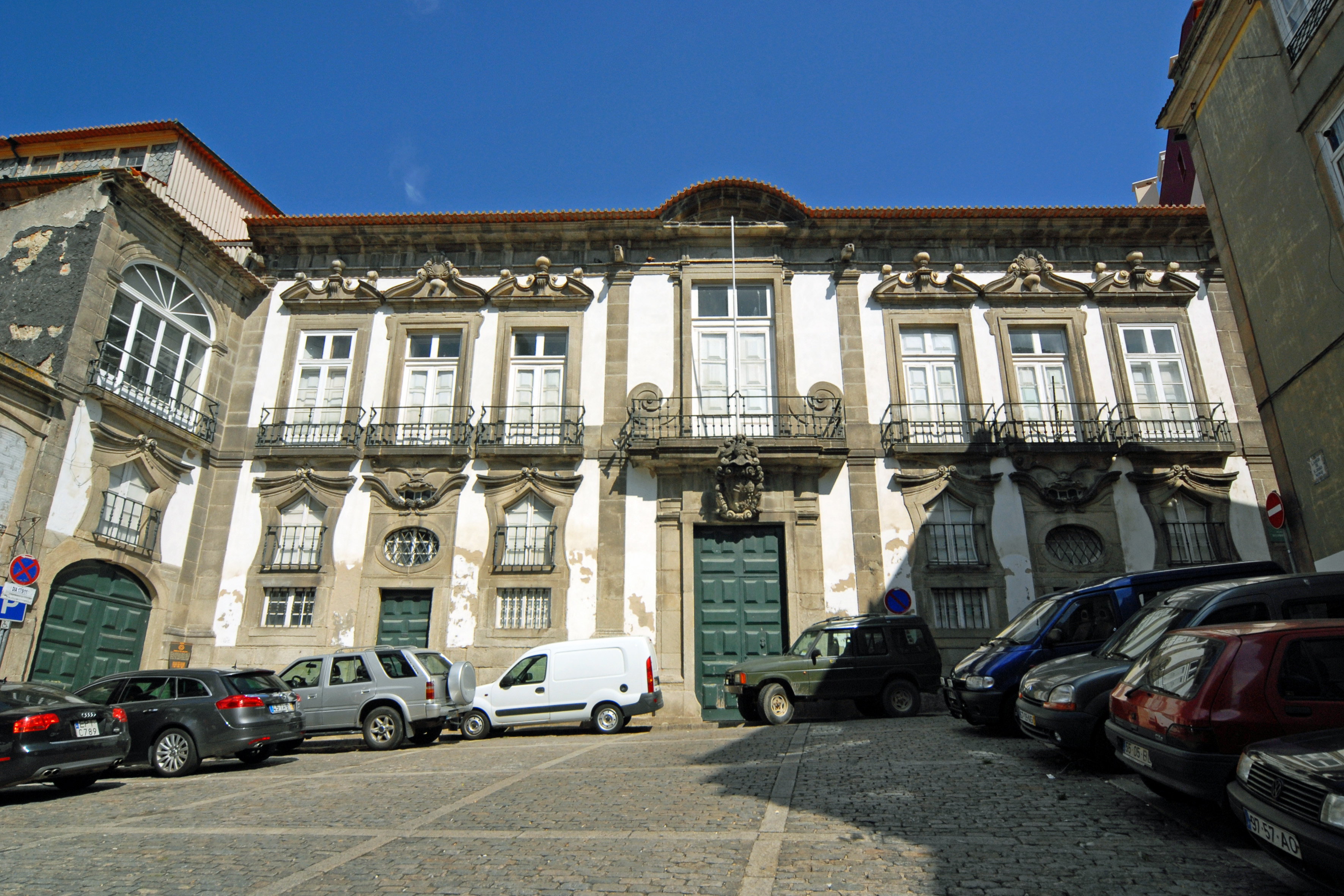 Palácio de S. João Novo ou Museu de Etnografia e História This file was uploaded for Wiki Loves Monuments in Portugal with the unique identifier 74816.